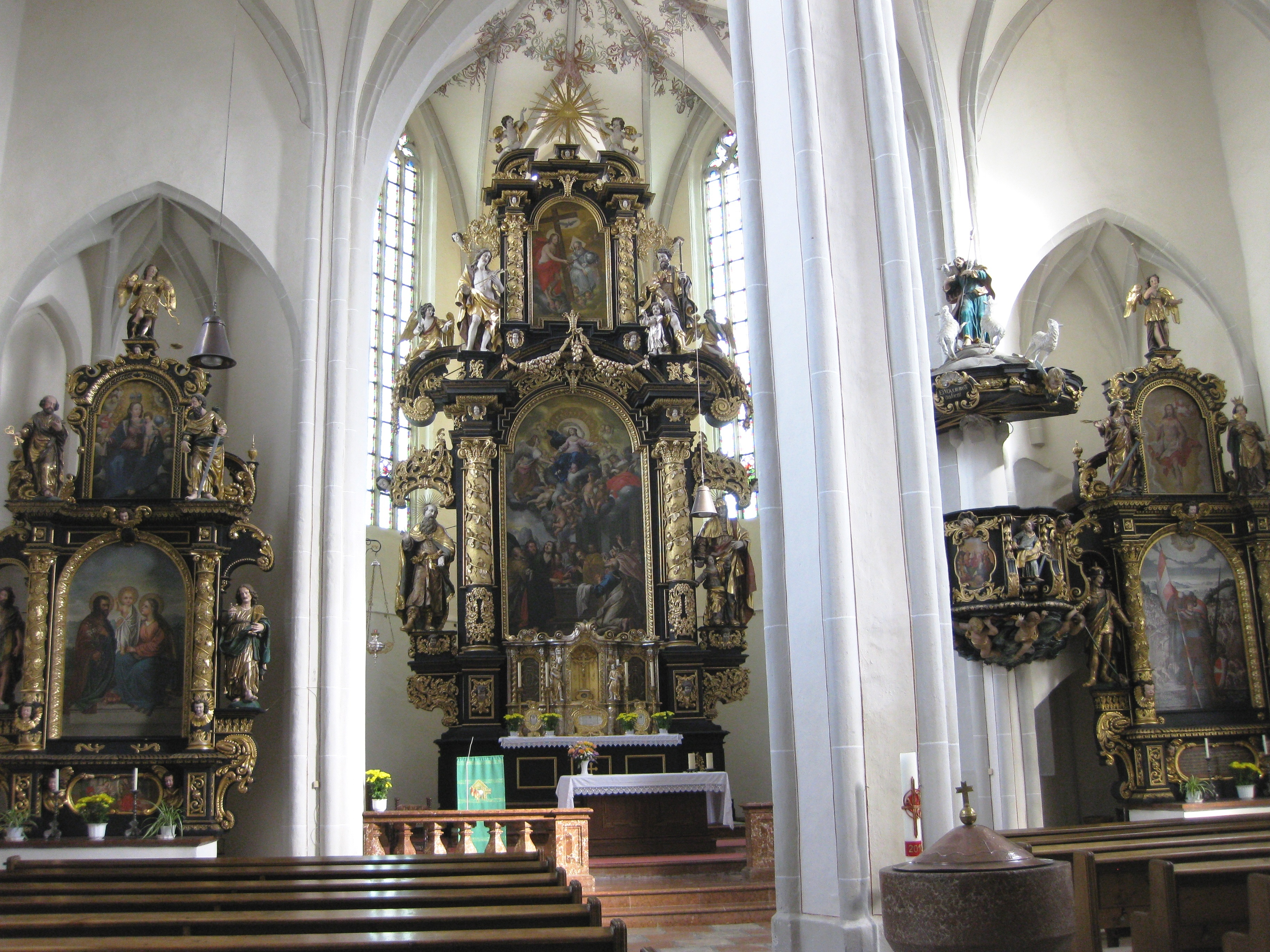 Altäre